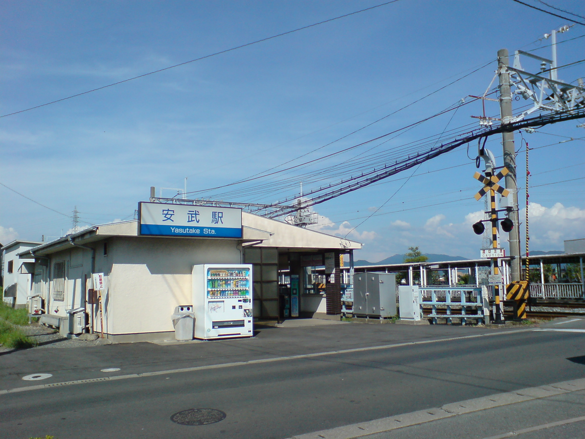 西鉄安武駅の駅舎